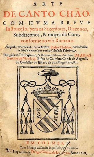 Arte de Canto Chao, tratado musical de Pedro Talésio.